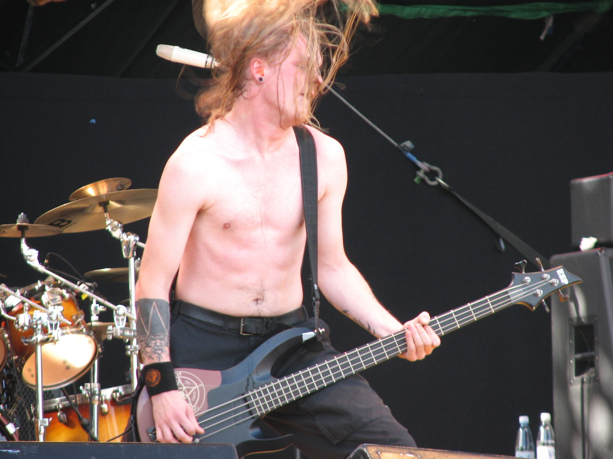 Kai-Pekka Kangasmäki of Stam1na at Qstock 2007